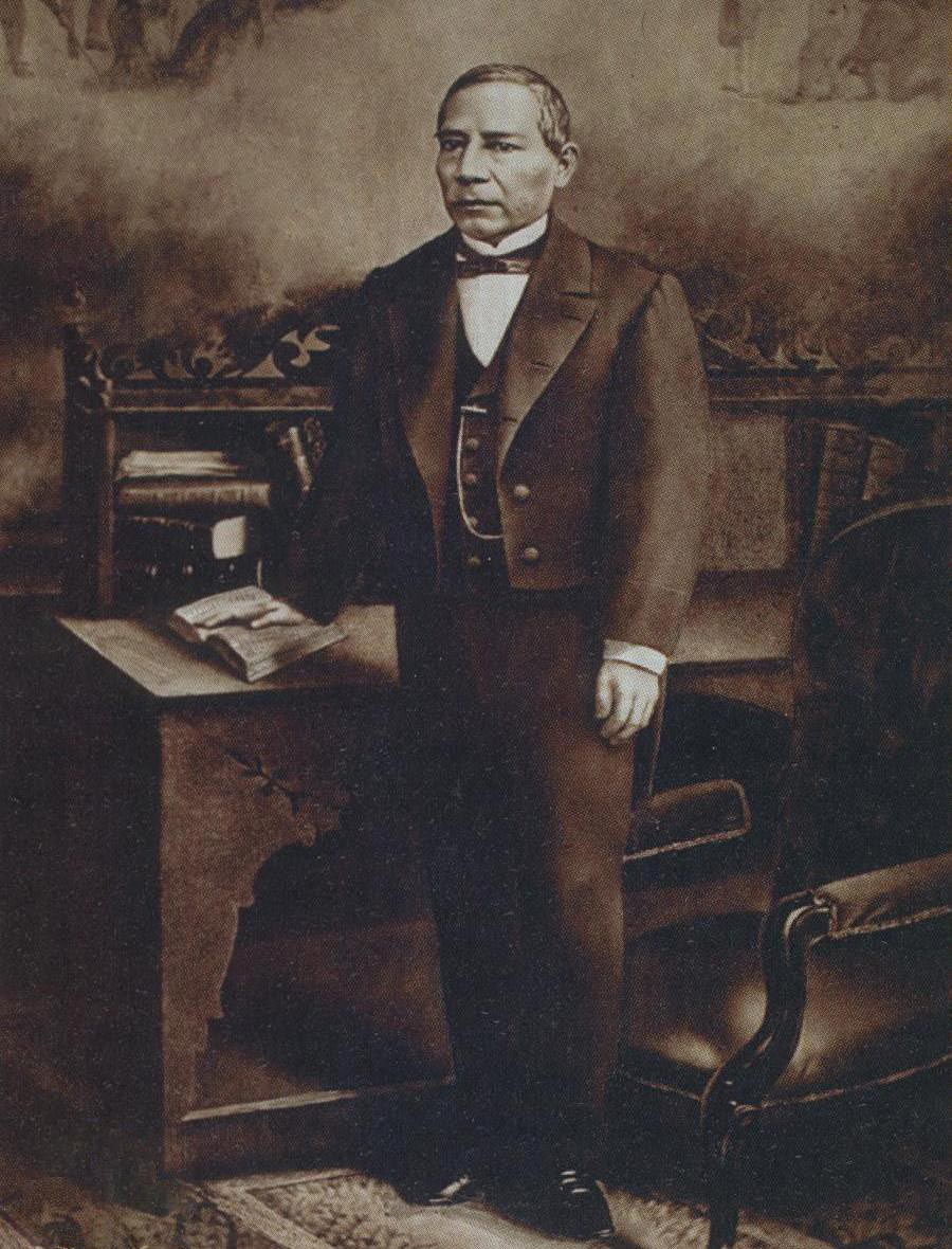 Retrato de Benito Juárez de Atanasio Vargas. Recinto Juárez, Palacio Nacional.